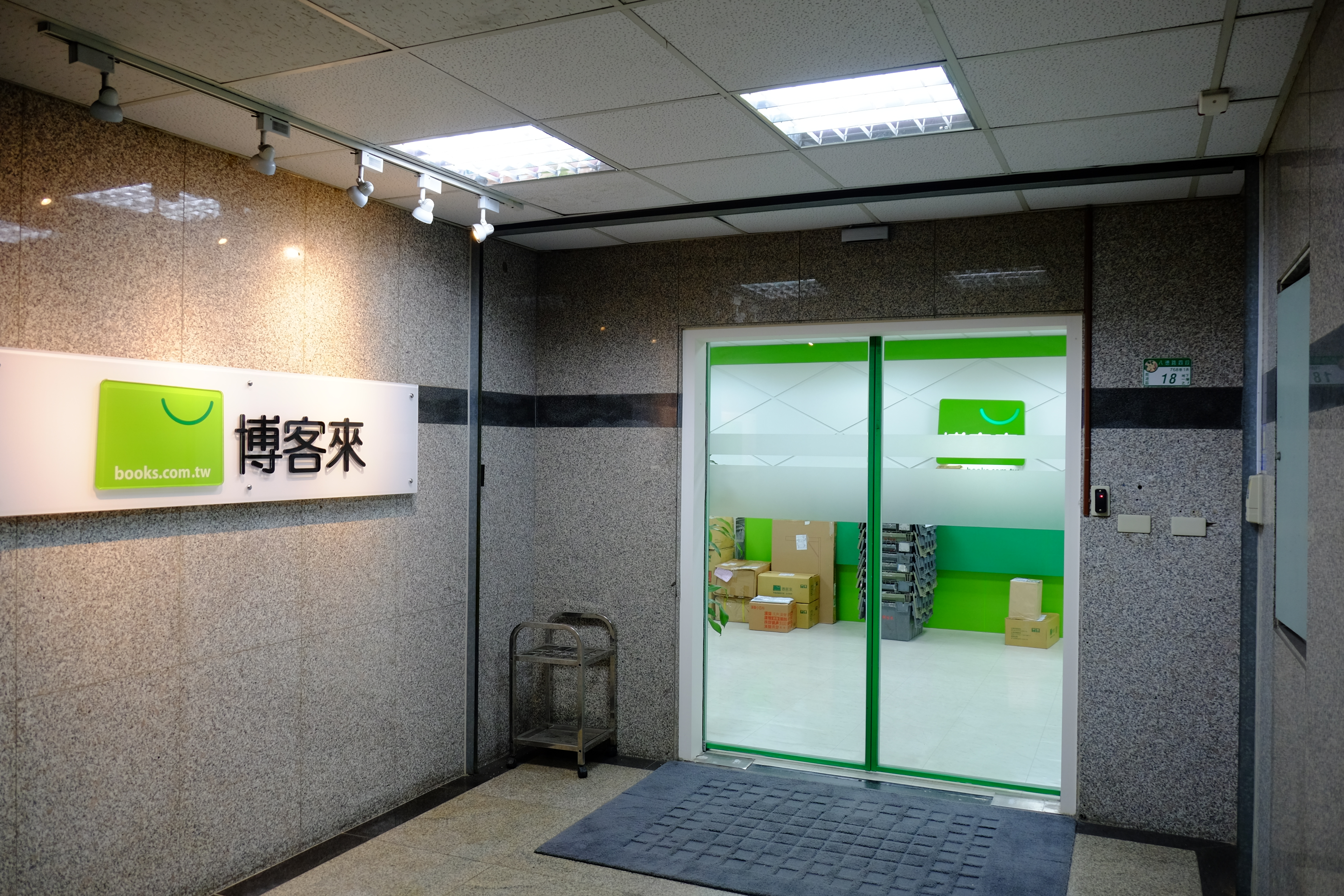 博客來數位科技總部大門，位於新矽谷工商大樓地下一樓，地址：臺北市南港區八德路四段768巷1弄18號B1之1。